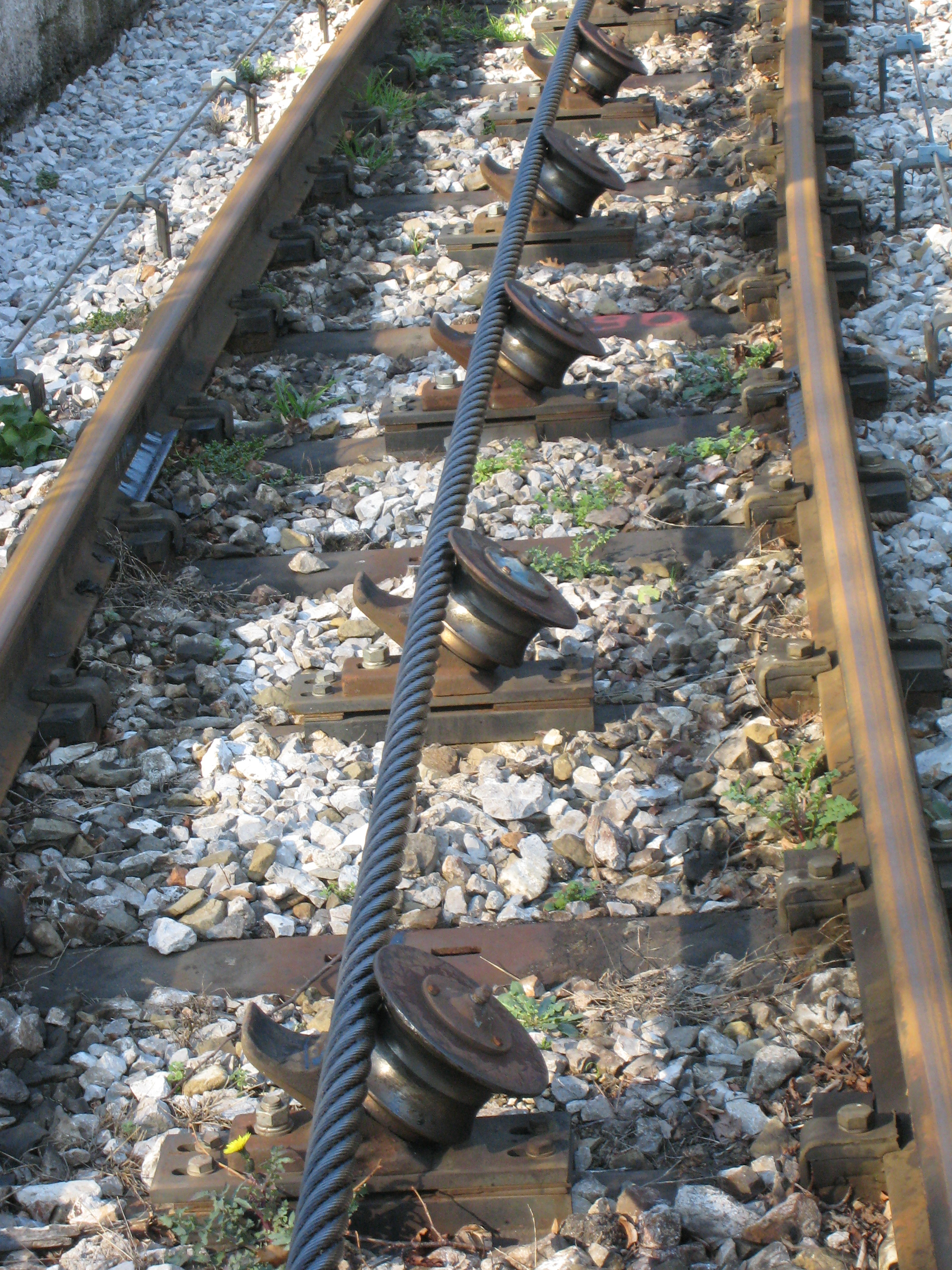 Particolare del ruotismo guidafune del tram de Opcina (TS). Gennaio 2008